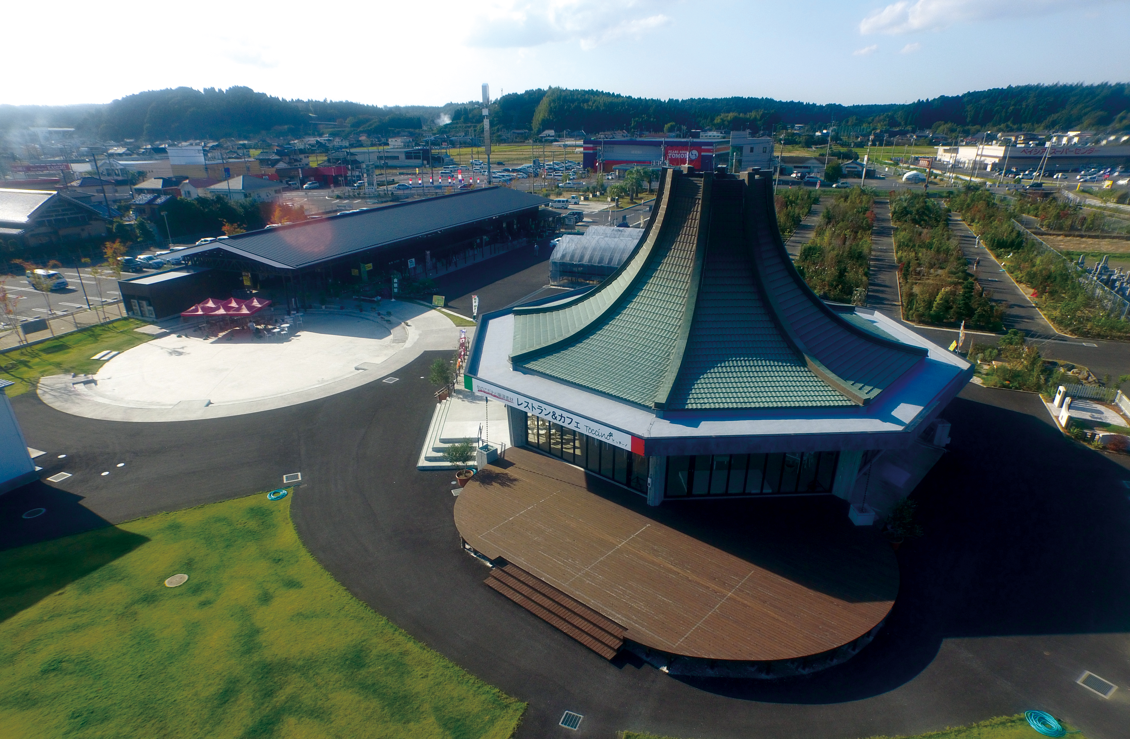 千葉県東金市田間1300-3 道の駅みのりの郷東金 上空からの画像（みのり1号による撮影）